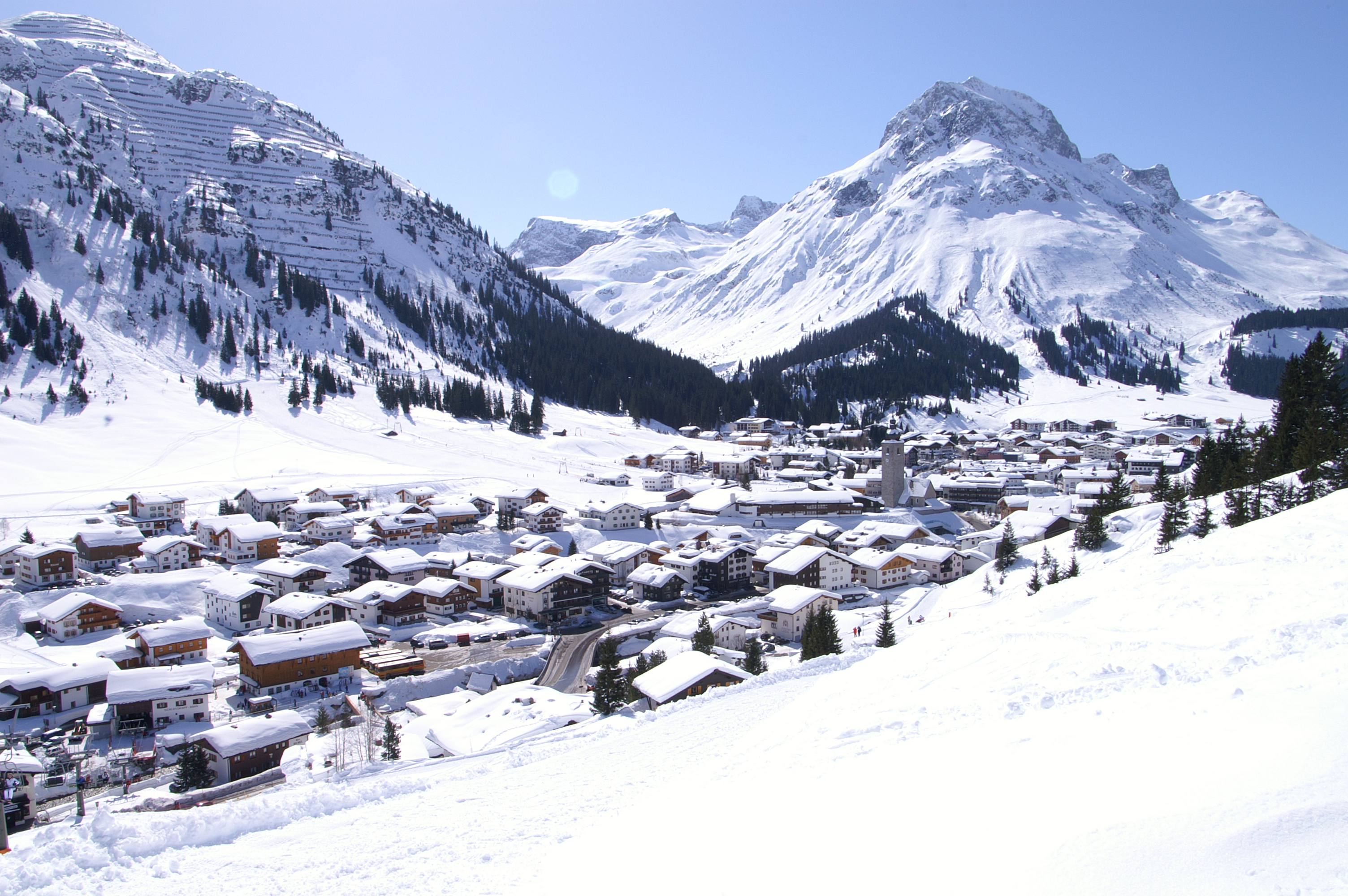 Omeshorn (2557 m) rechts, südlich über Lech am Arlberg im Lechquellengebirge in Vorarlberg, links des Omeshorns führt das Tal des Zürsbaches nach Zürs und weiter zum Flexenpass, ganz links der Rüfikopf.